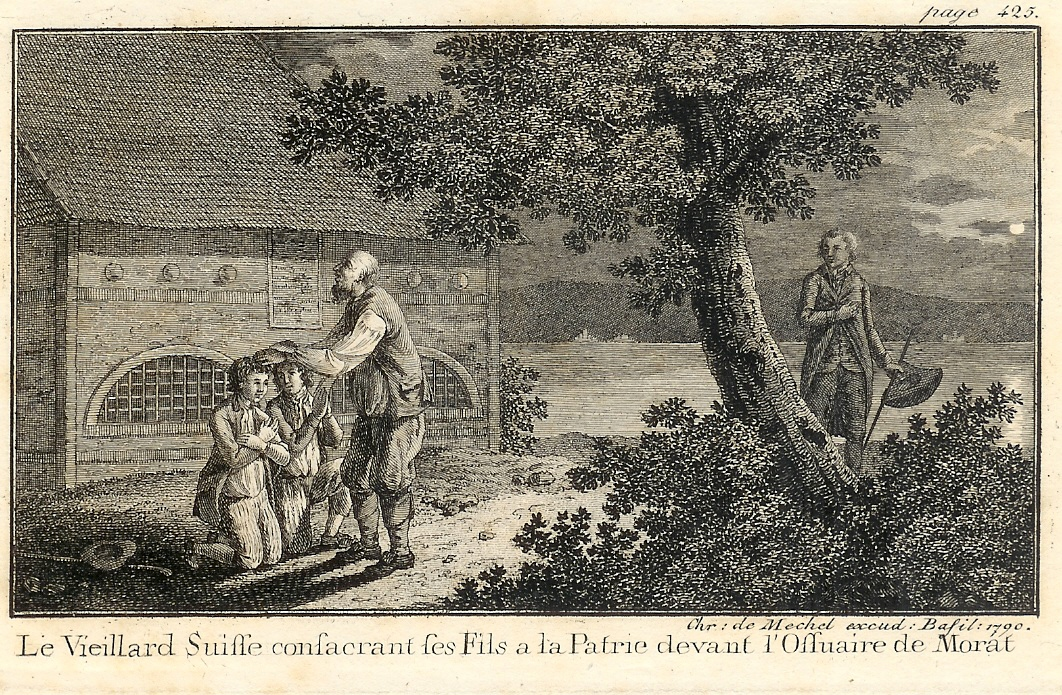 Eigener Scan eines eigenen mit 1790 datierten Kupferstiches von Chritian von Mechel mit dem Titel: Le Viellard Suisse consacraynt ses Fils à la Patrie devant l`Ossuaire de Morat